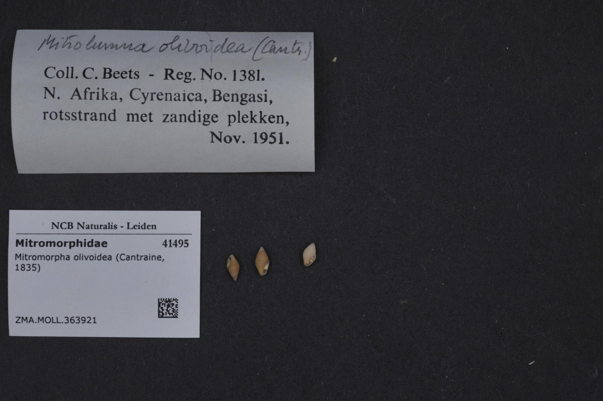 Mitromorpha olivoidea (Cantraine, 1835)